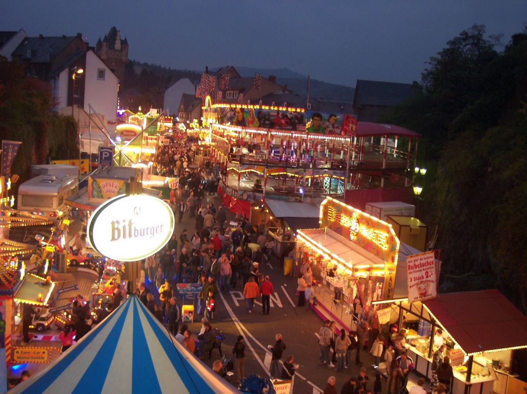 Blick auf den Lukasmarkt am Obertor/Boemundring von der Burgbrücke aus. 2006 - Überblick.